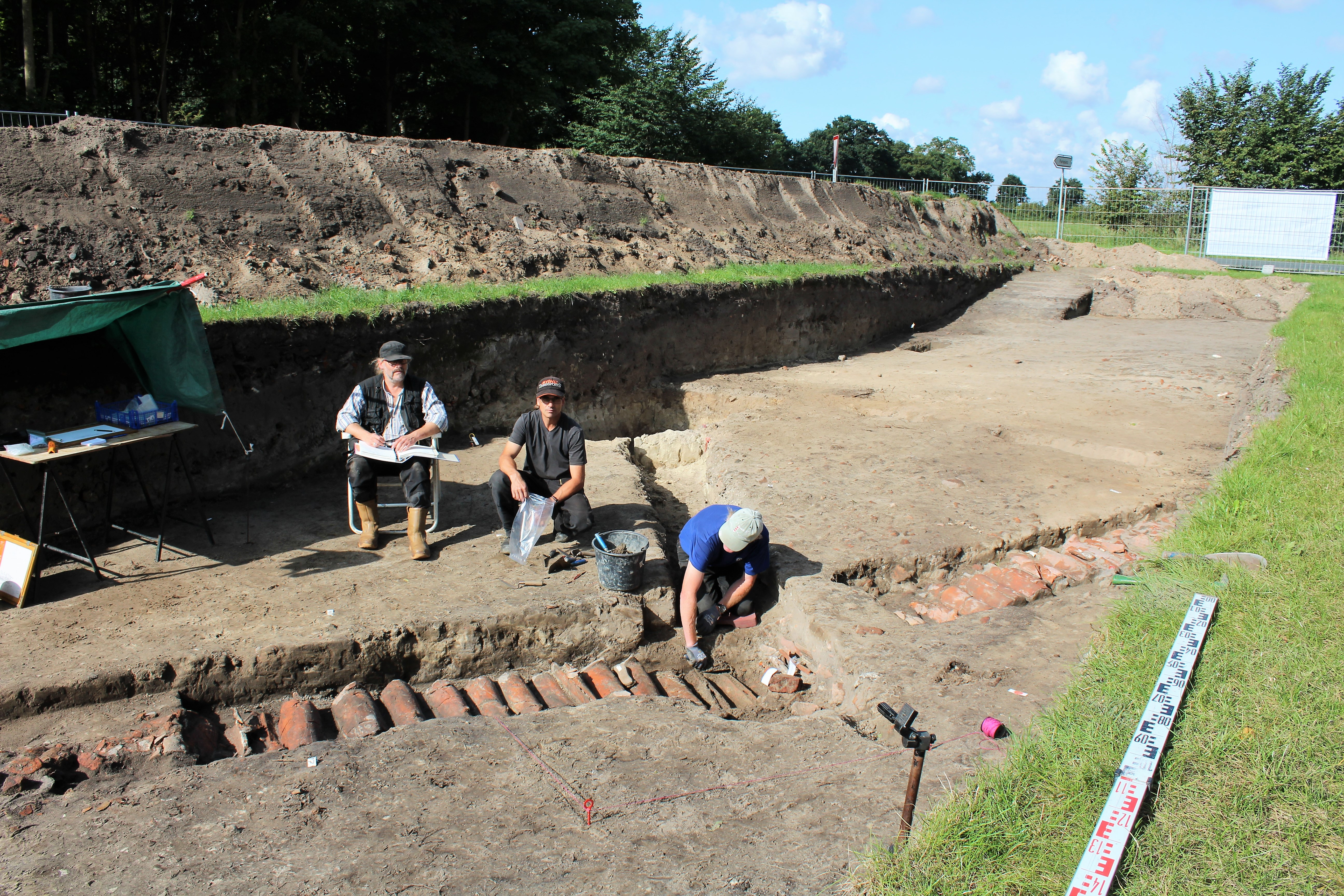 Ausgrabung Sept. 2017, Steinhaus Bunderhee, Landkreis Leer, Ostfriesland, Deutschland